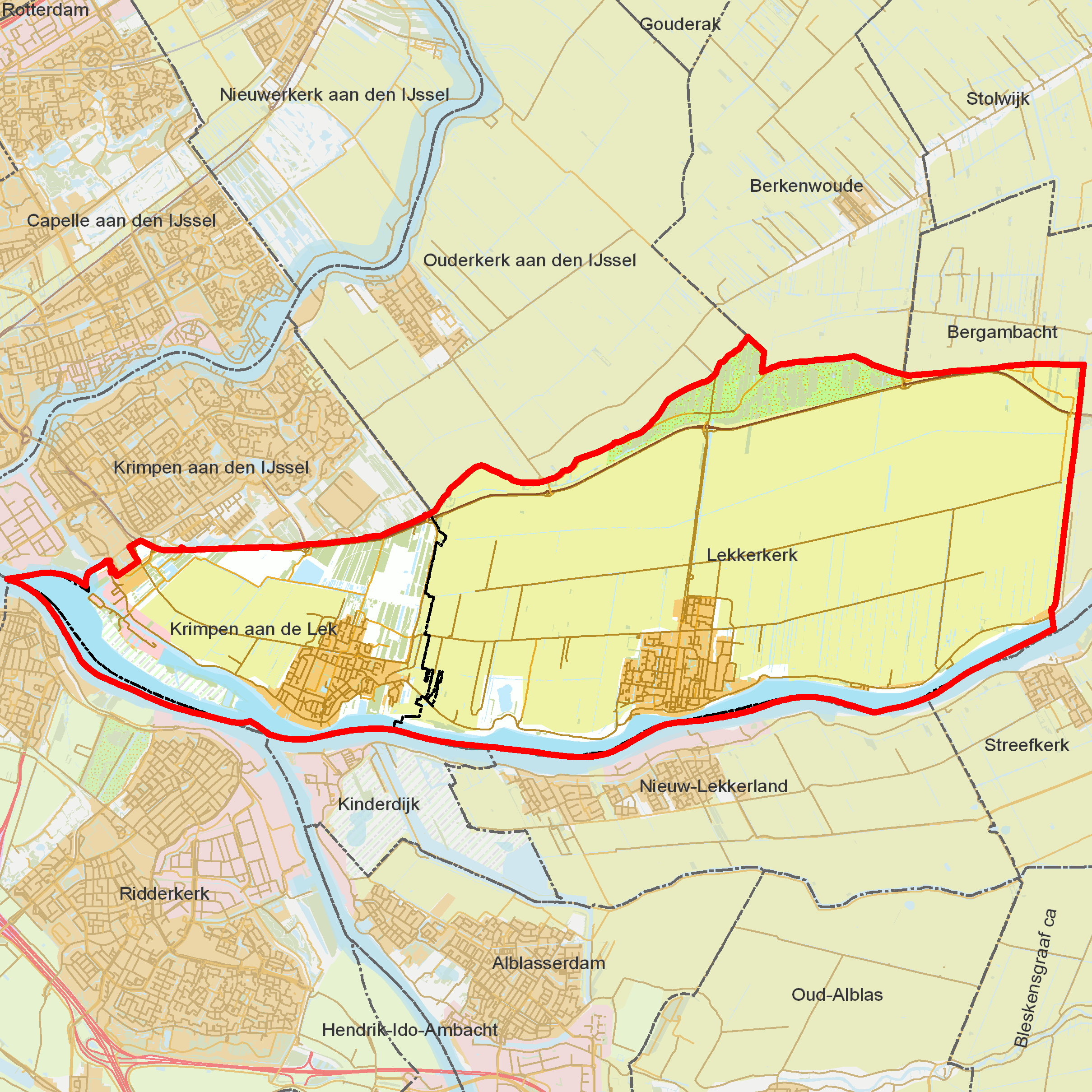 BAG woonplaatsen - Gemeente Nederlek.png